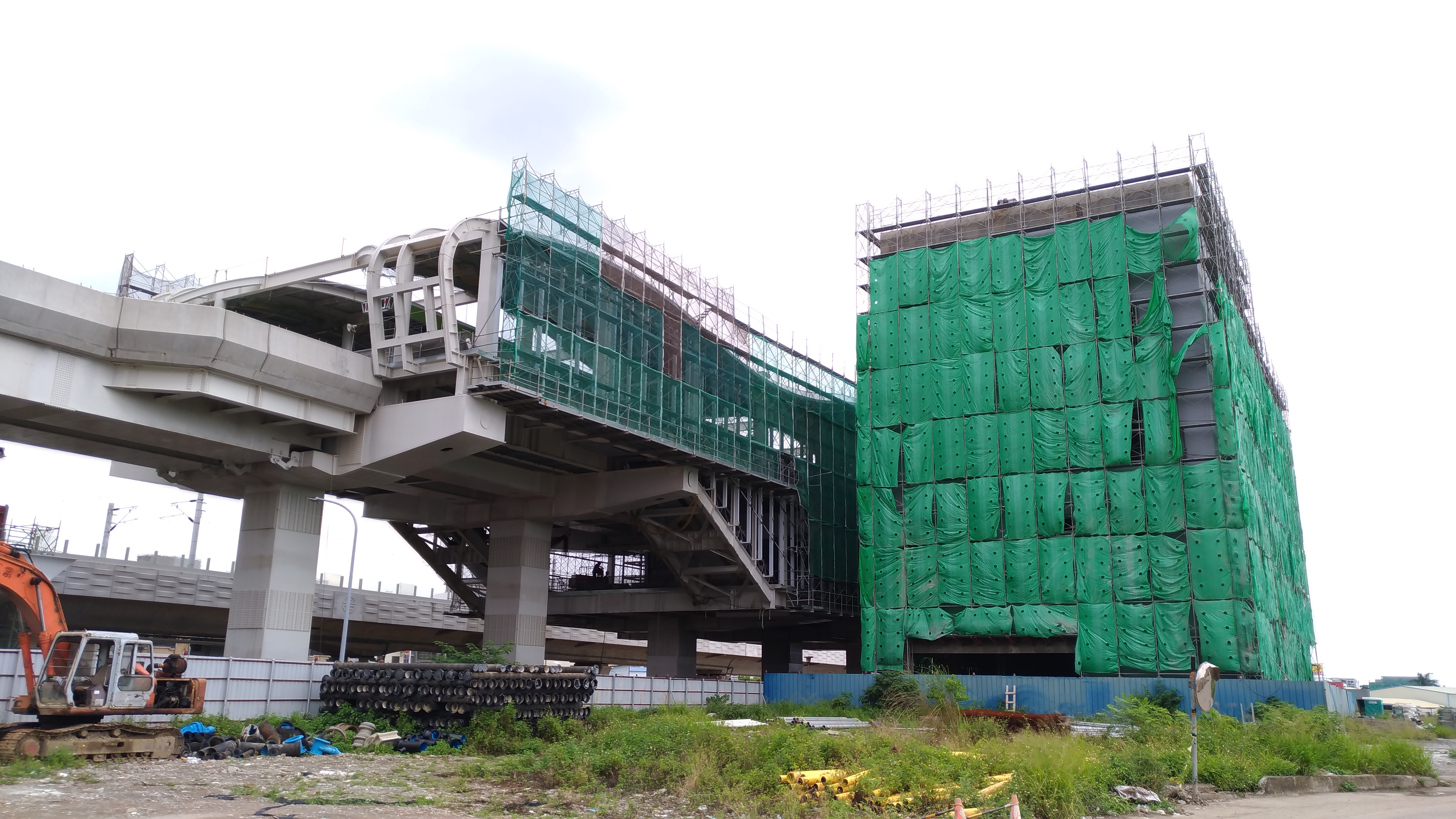 臺中捷運G13站2017年5月工程